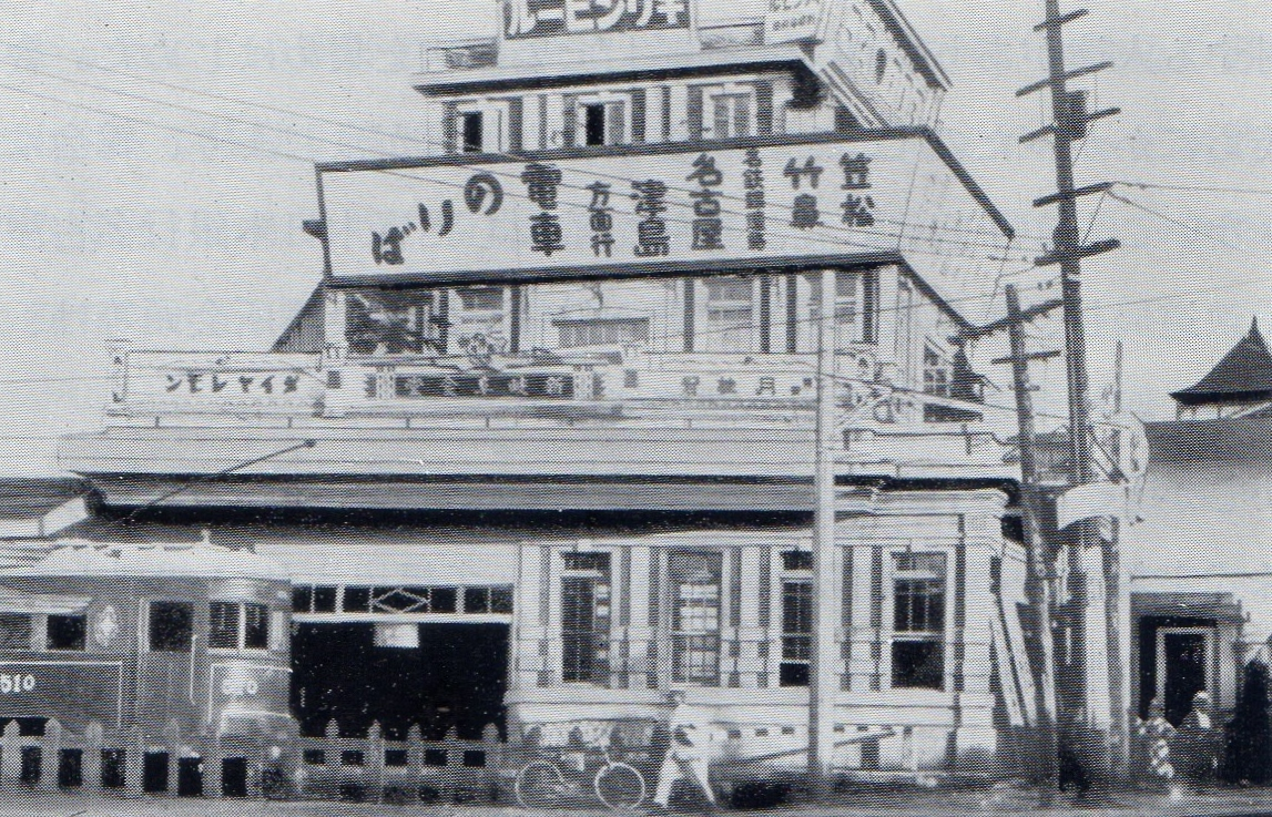 美濃電の新岐阜駅